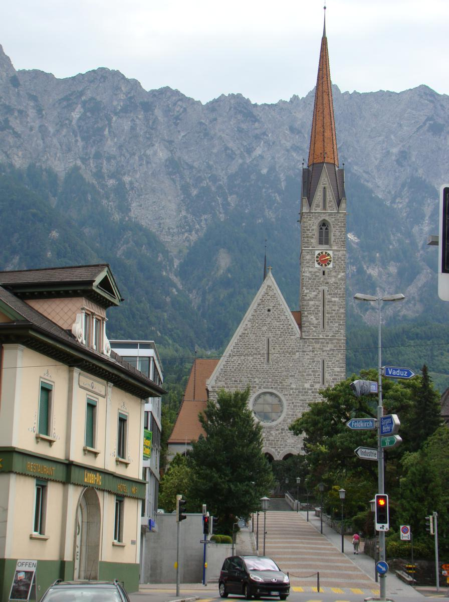 Церковь в Шан (Лихтенштейн)